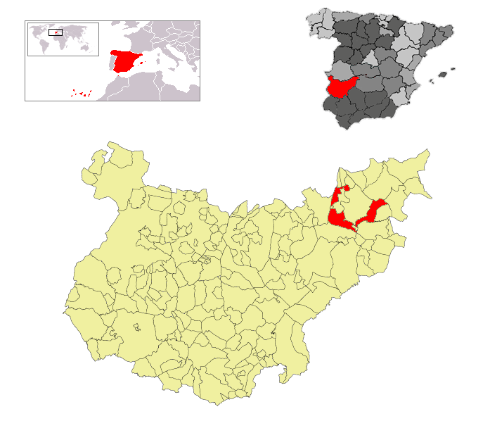 Ubicación de Puebla de Alcocer